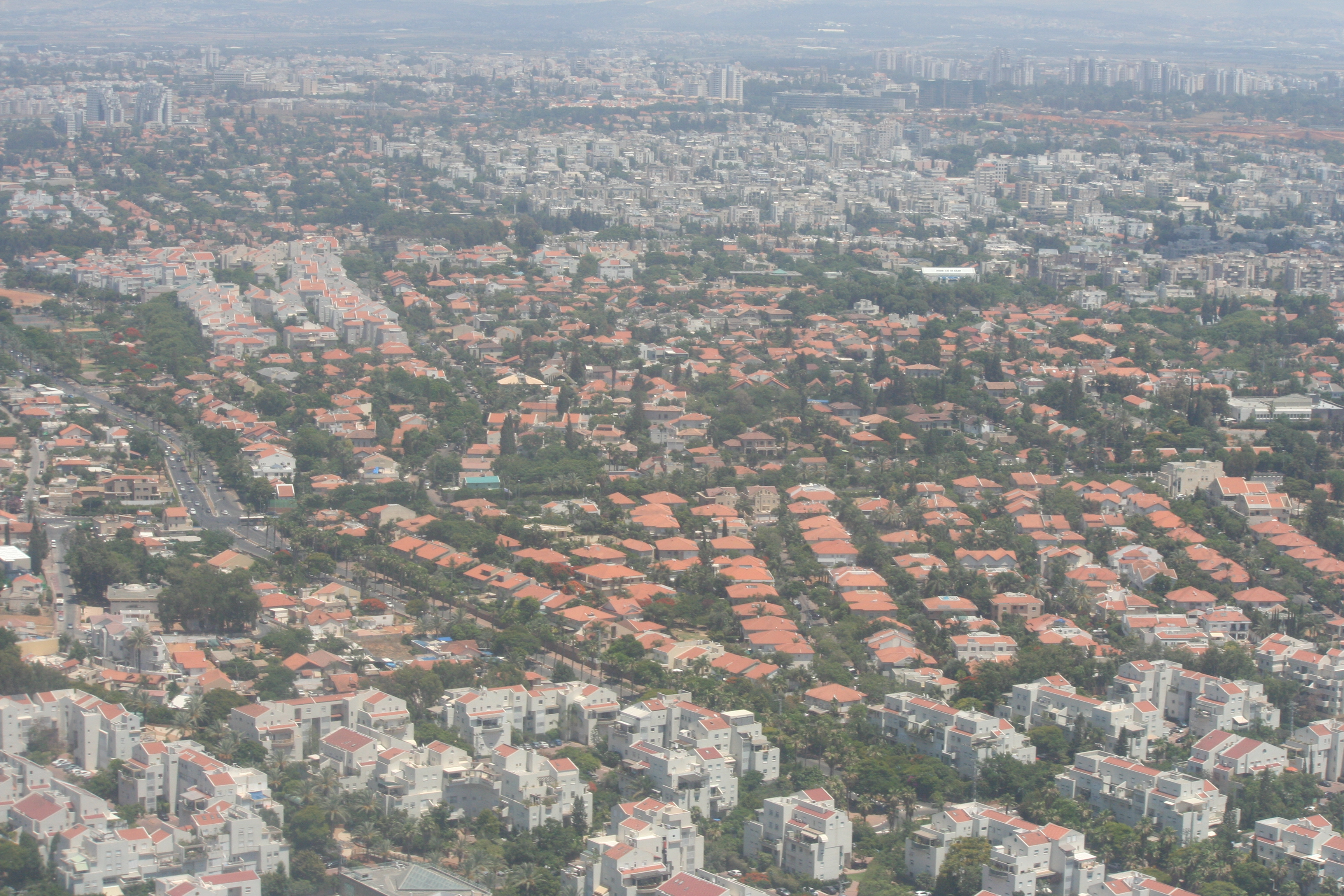 רעננה